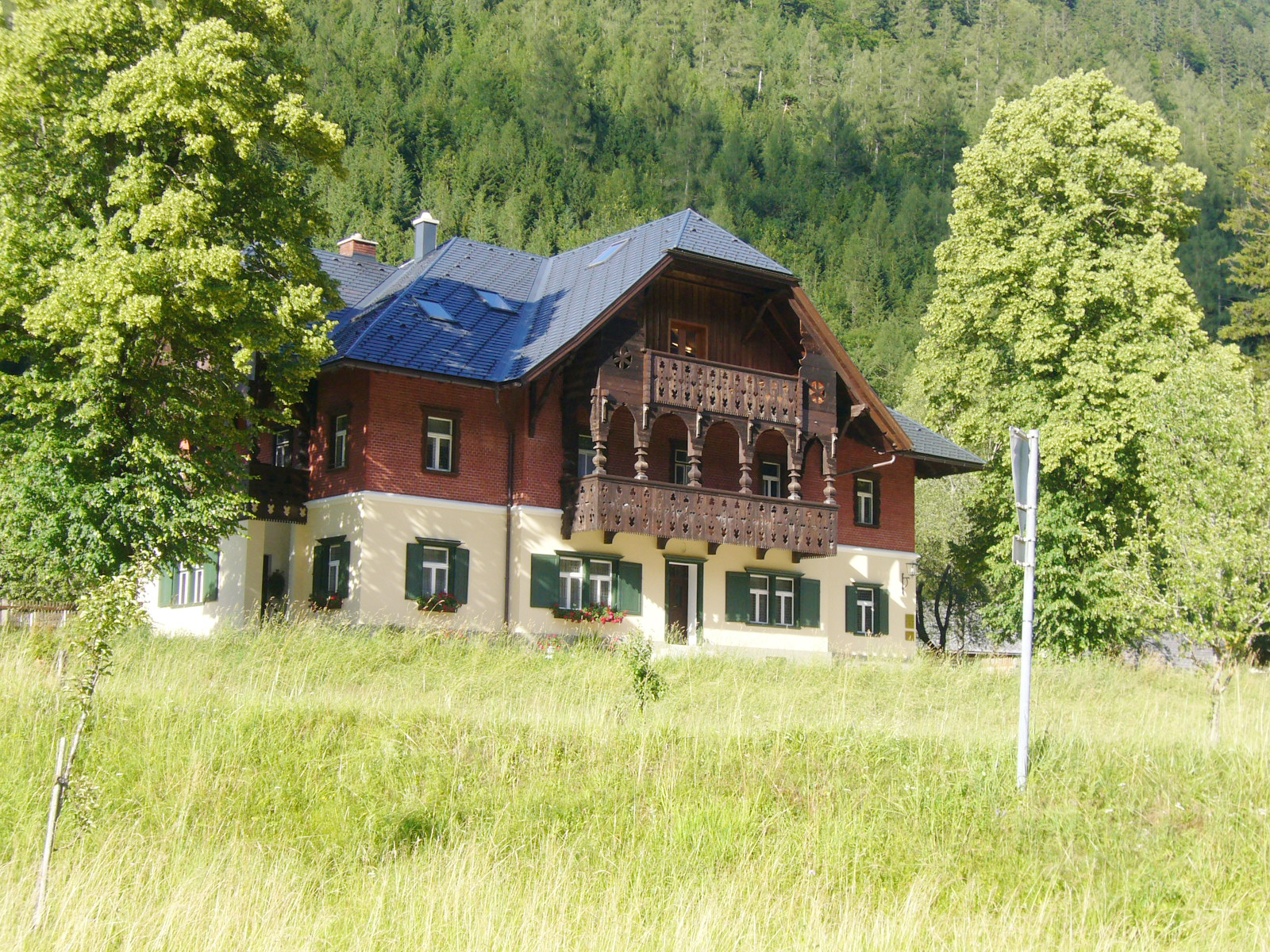 rothschildhaus